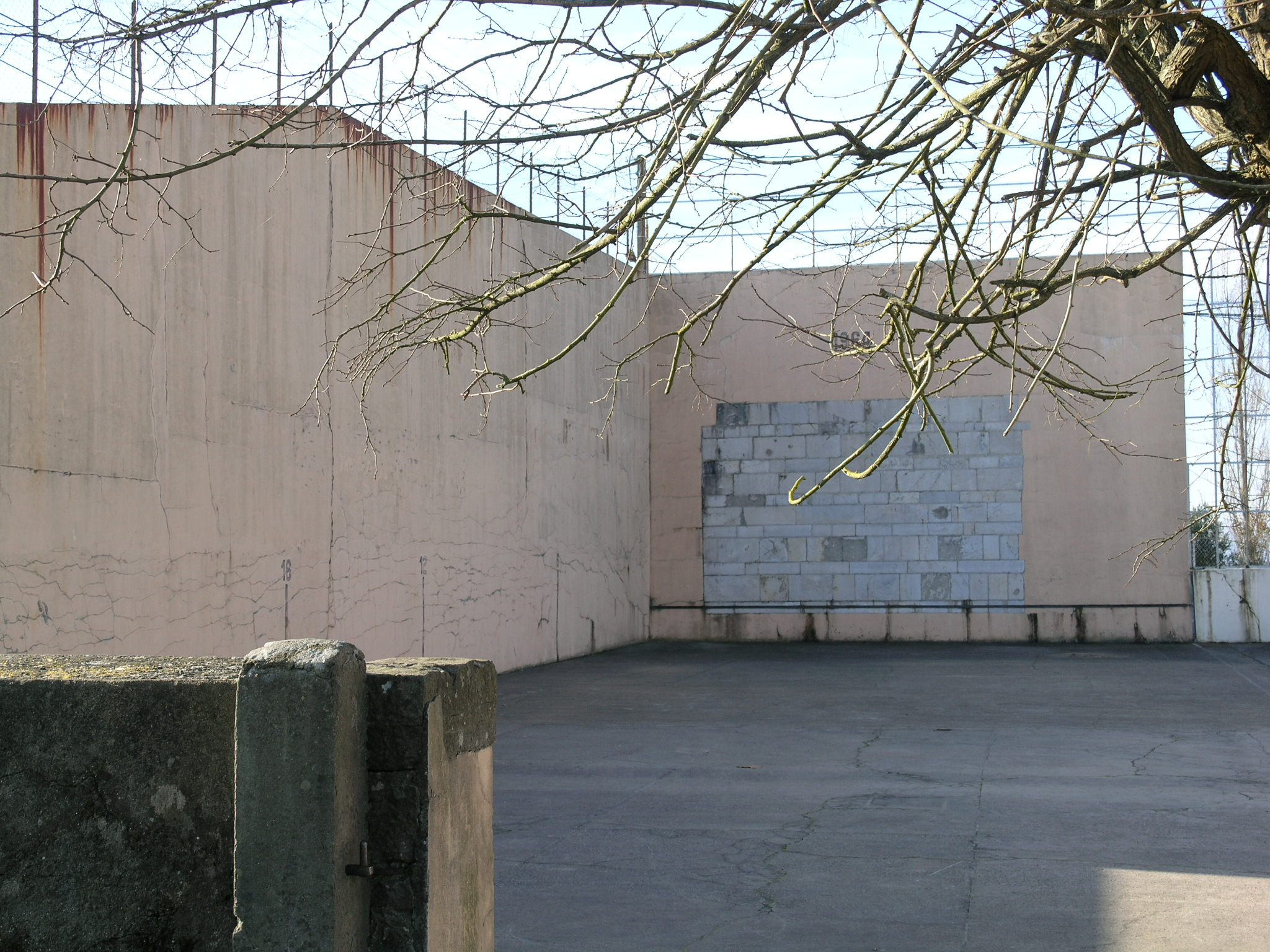 Fronton mur à gauche d'Arbérats, Arbérats-Sillègue, Pyrénées-Atlantiques (64), France